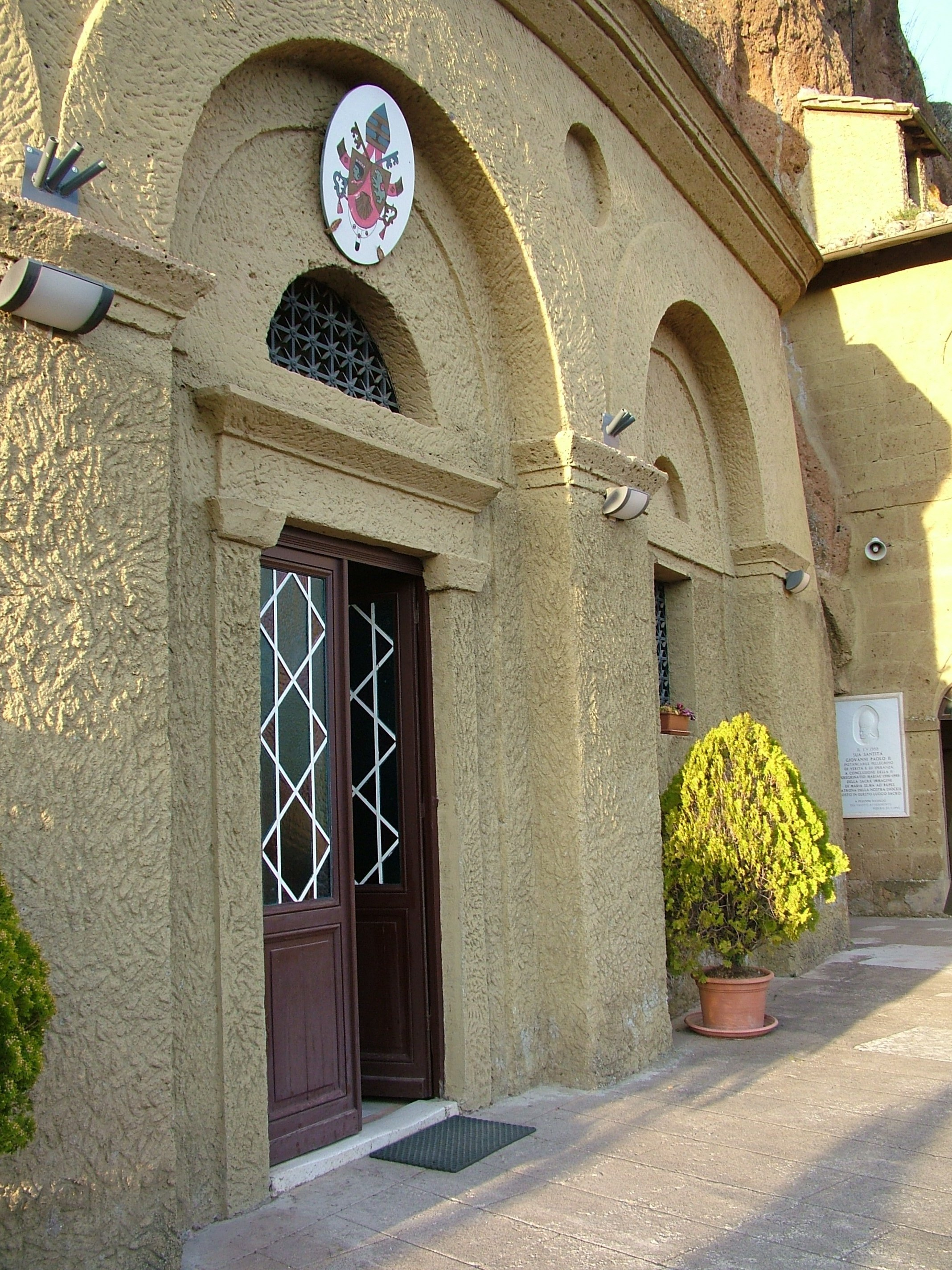 Santuario di Maria Santissima ad rupes (a Castel Sant'Elia).